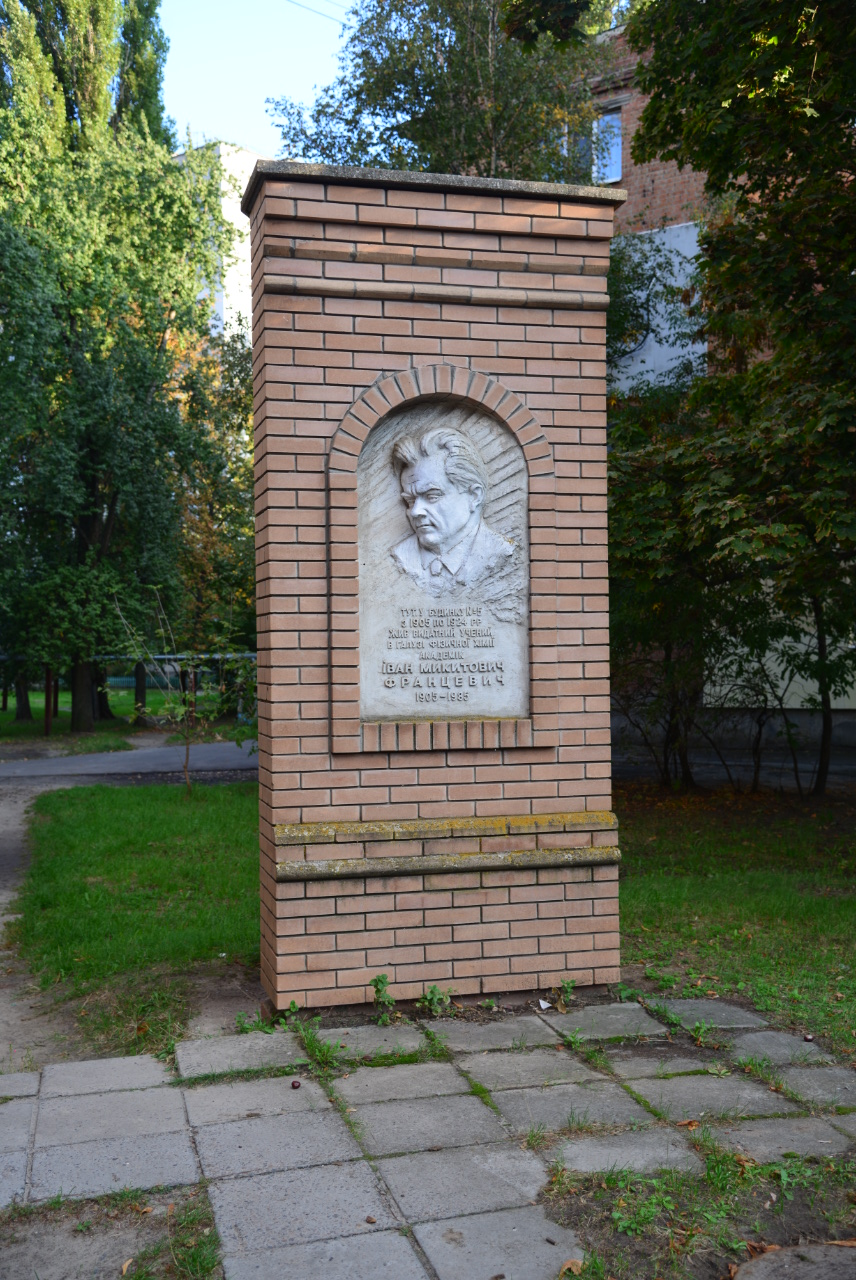 Пам'ятний знак на честь видатного вченого в галузі матеріалознавства, академіка, Героя Соціалістичної Праці І. М. Францевича (1905—1985), Полтава, вул. Вузька